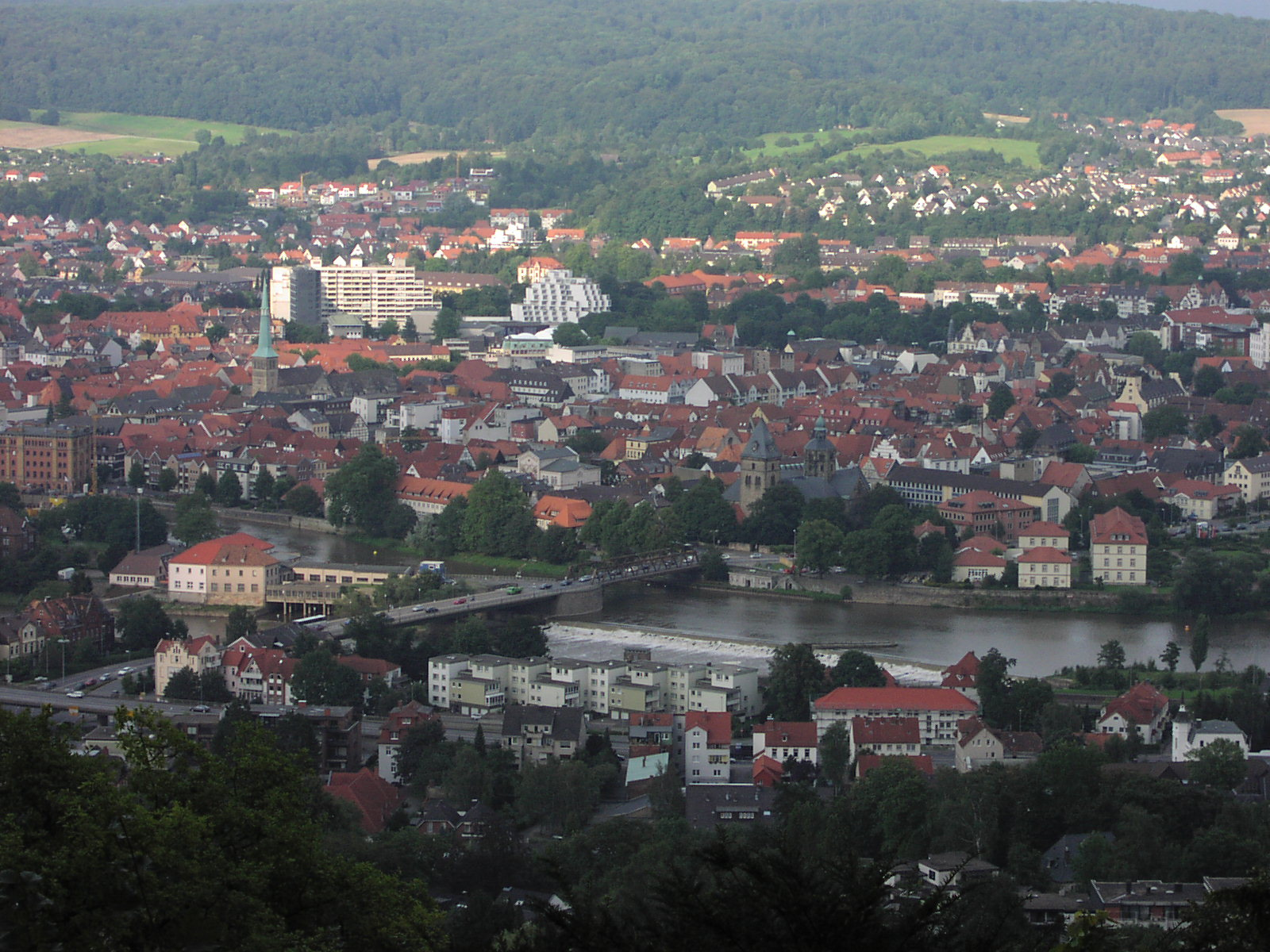 Hameln, Anblick vom Klüt